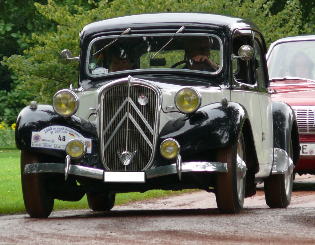 Citroën 11 CV Legère